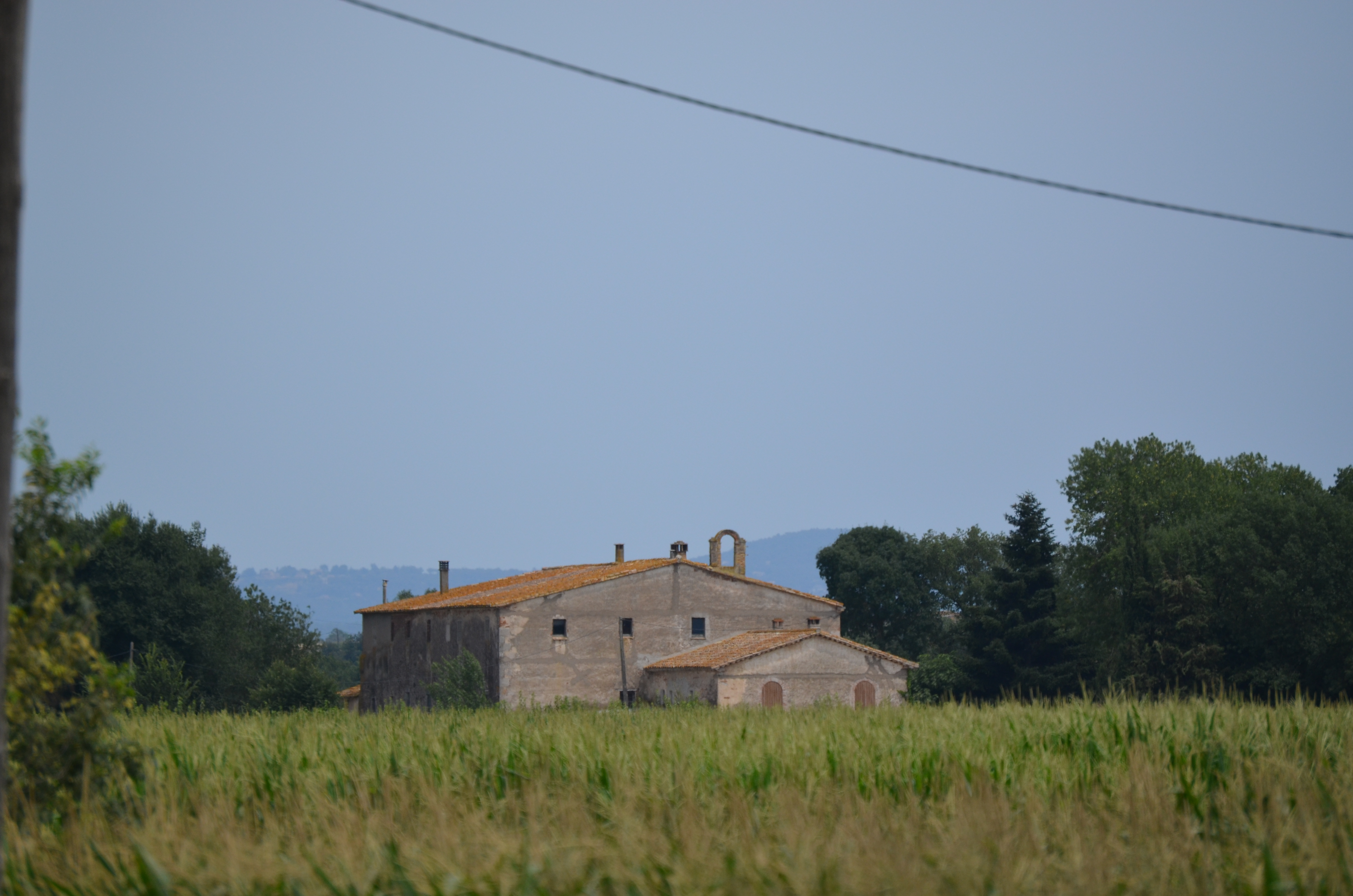 Riudellots de la Selva, Can Calderó Vell